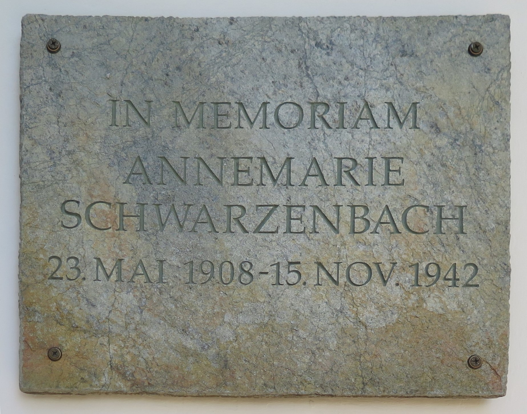 Gedenktafel für Annemarie Schwarzenbach am Haus Jäger in Sils Baselgia